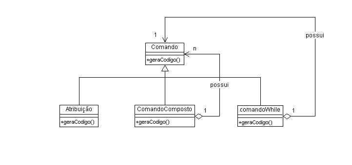 Hierarquia de Classes que utiliza o padrão de projeto Composite.